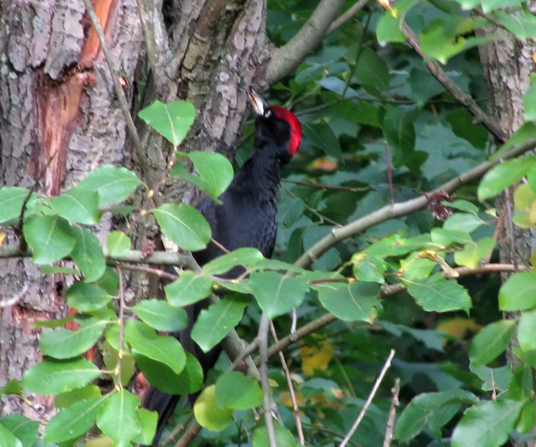 Dryocopus martius, Helsinki, Finland.